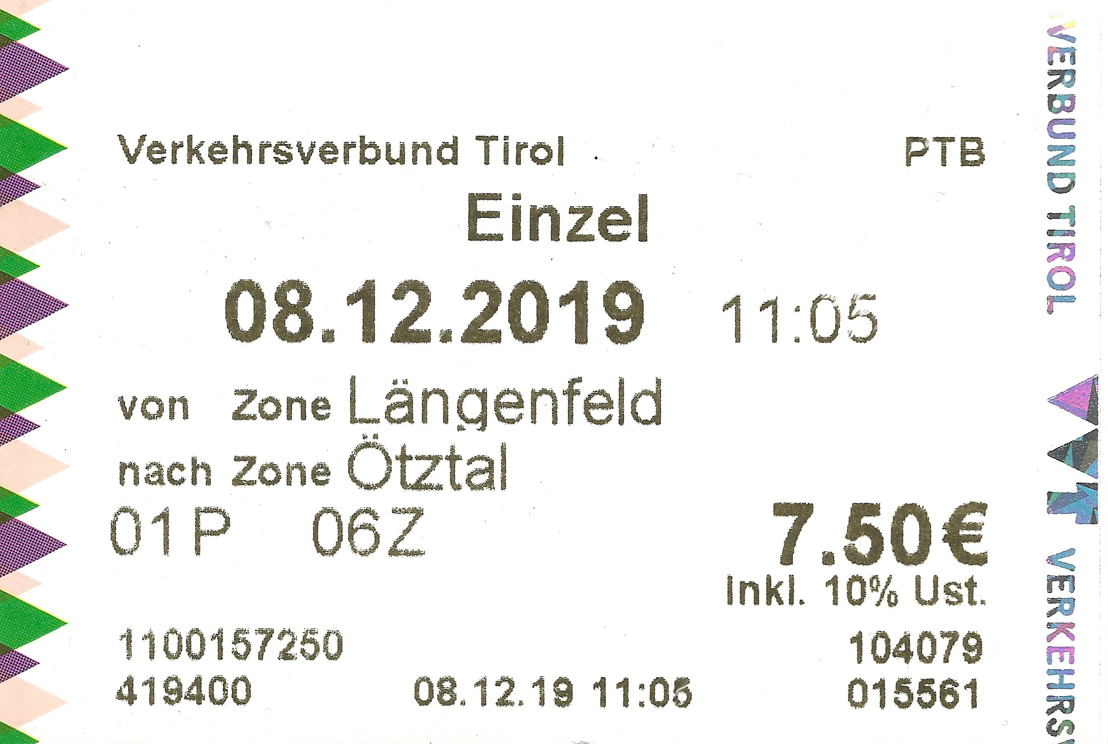 Fahrschein für Linienbus Verkehrsverbund Tirol (7,50 €)